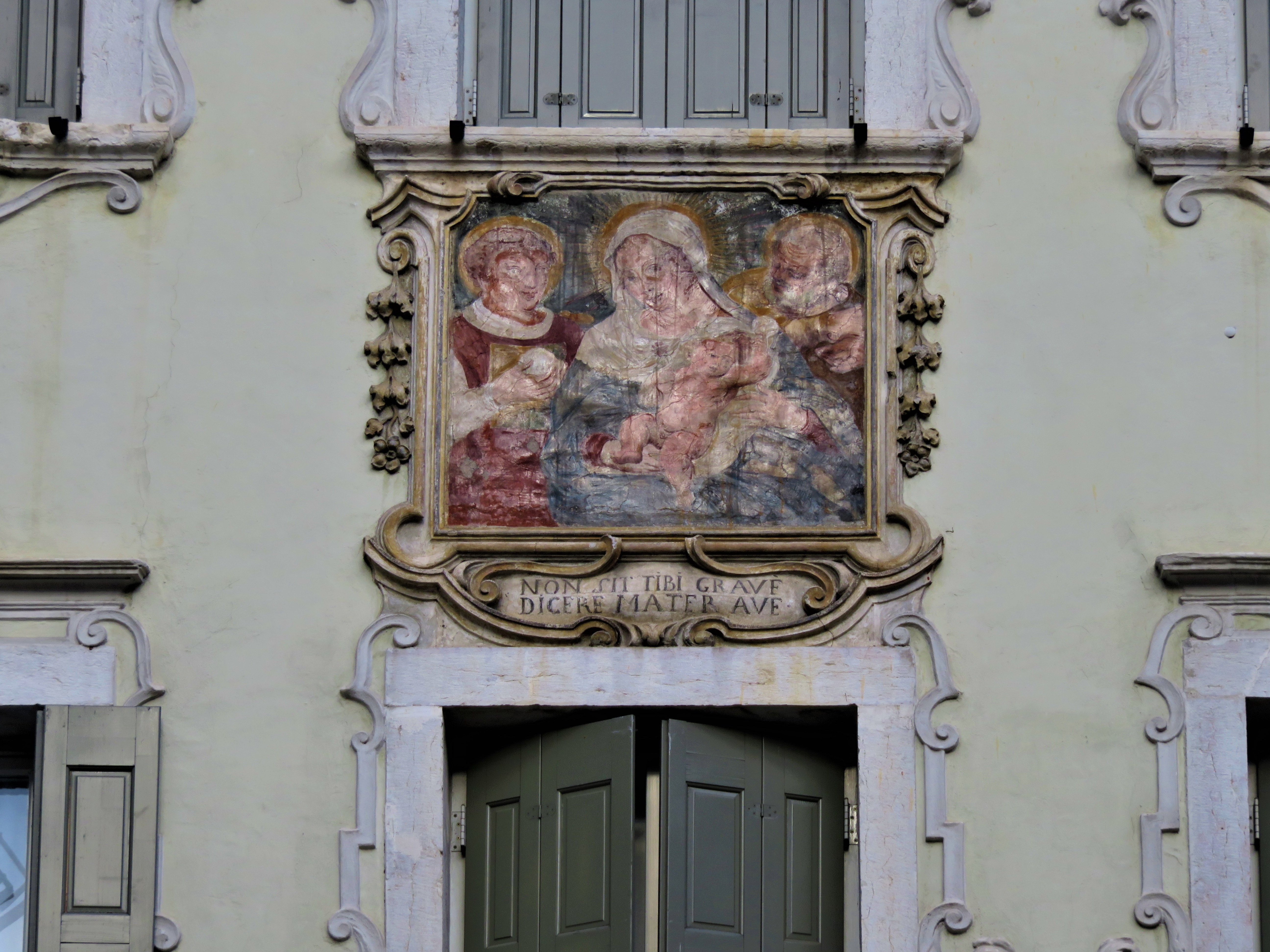 Piazza Battisti Rovereto. Madonna con Bambino e santi sulla facciata di casa Lenner